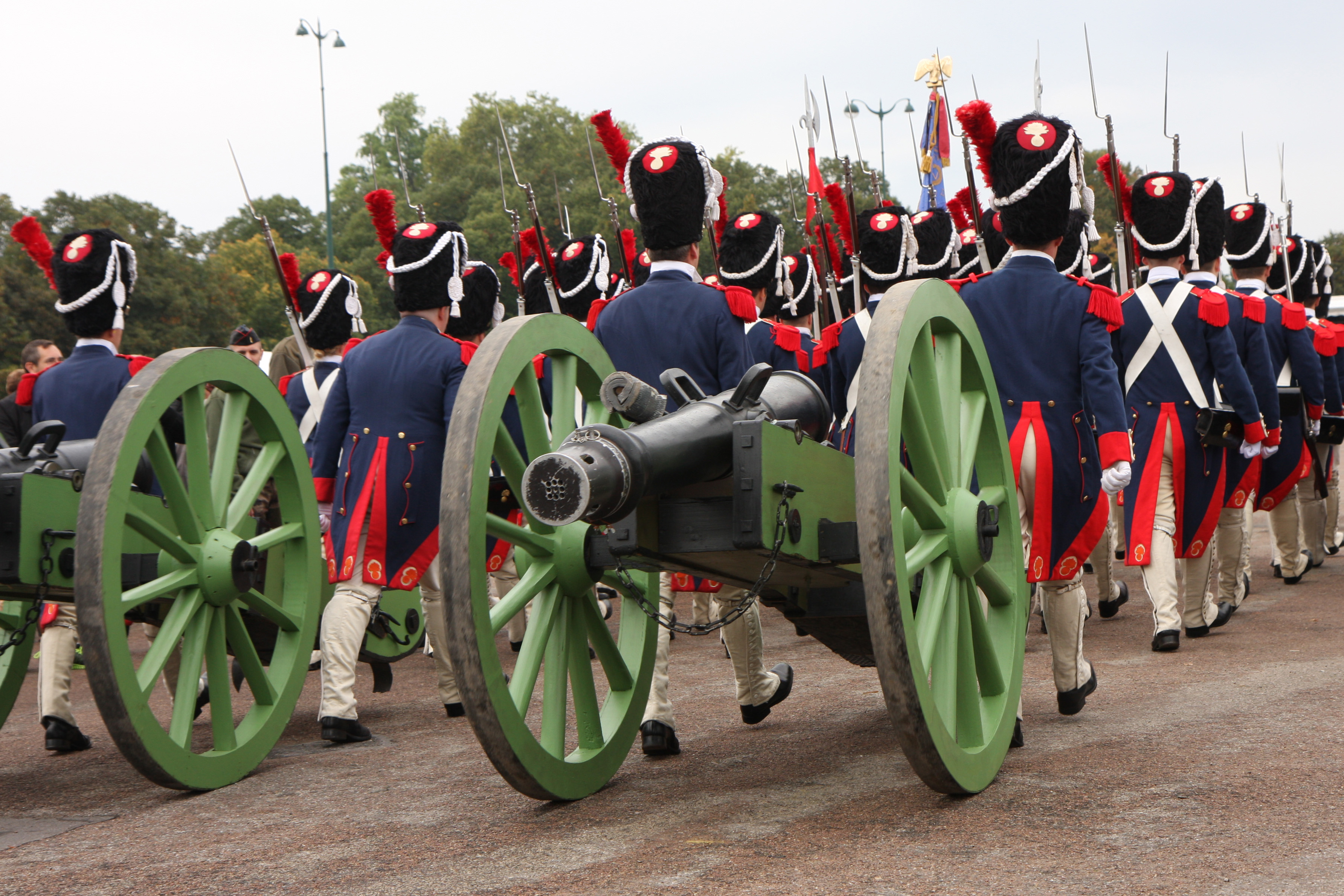 Les grenadiers de l'Empereur 3 - Quartier Carnot - Septembre 2013